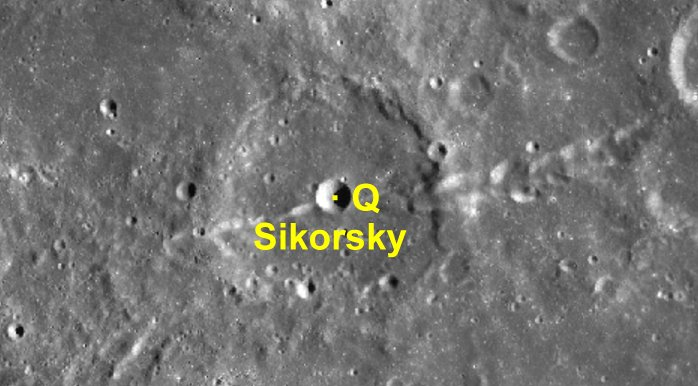 Cráter lunar Sikorsky. Cráteres satélite. (Imagen LRO)